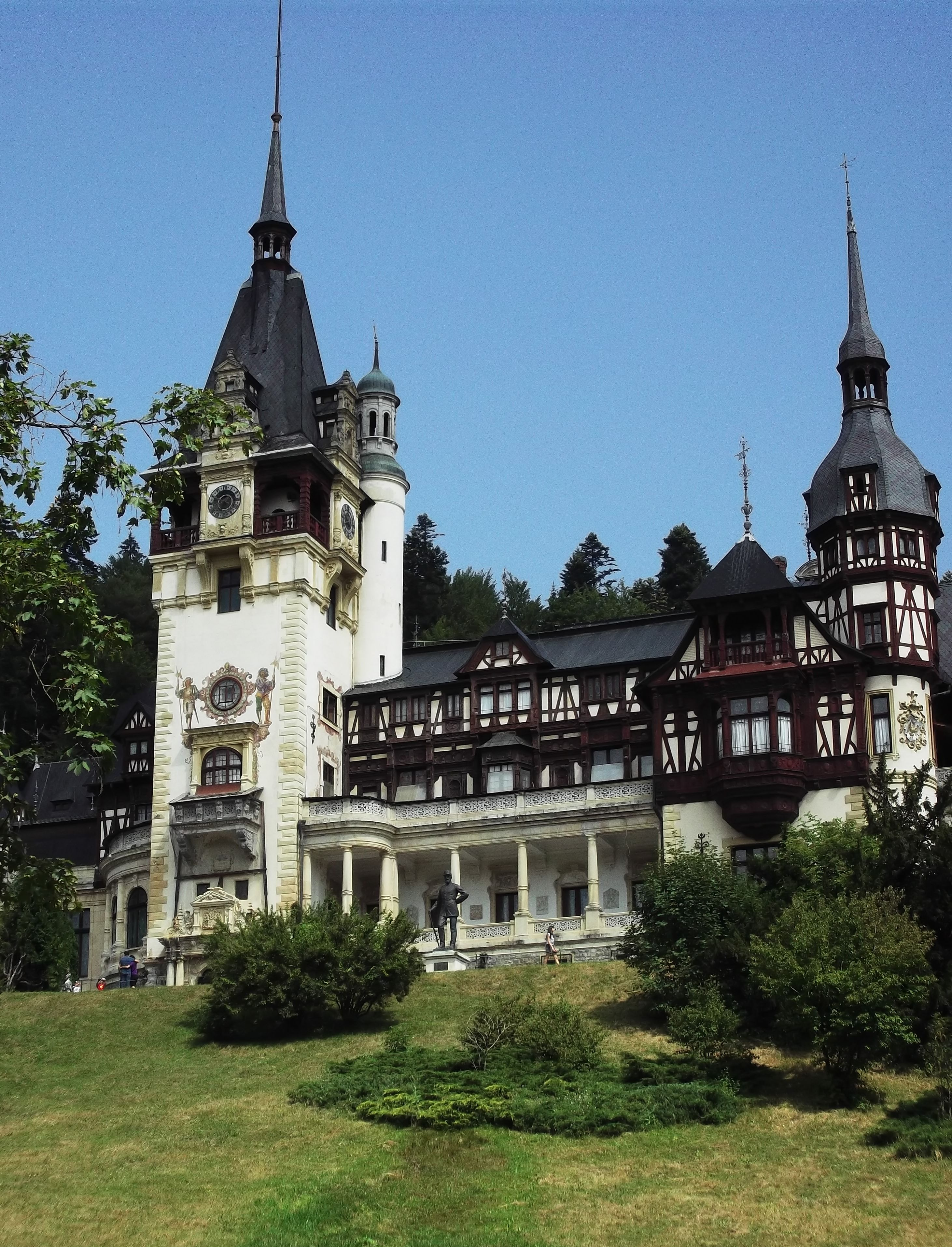 Castelul Peleș. 2013. 01